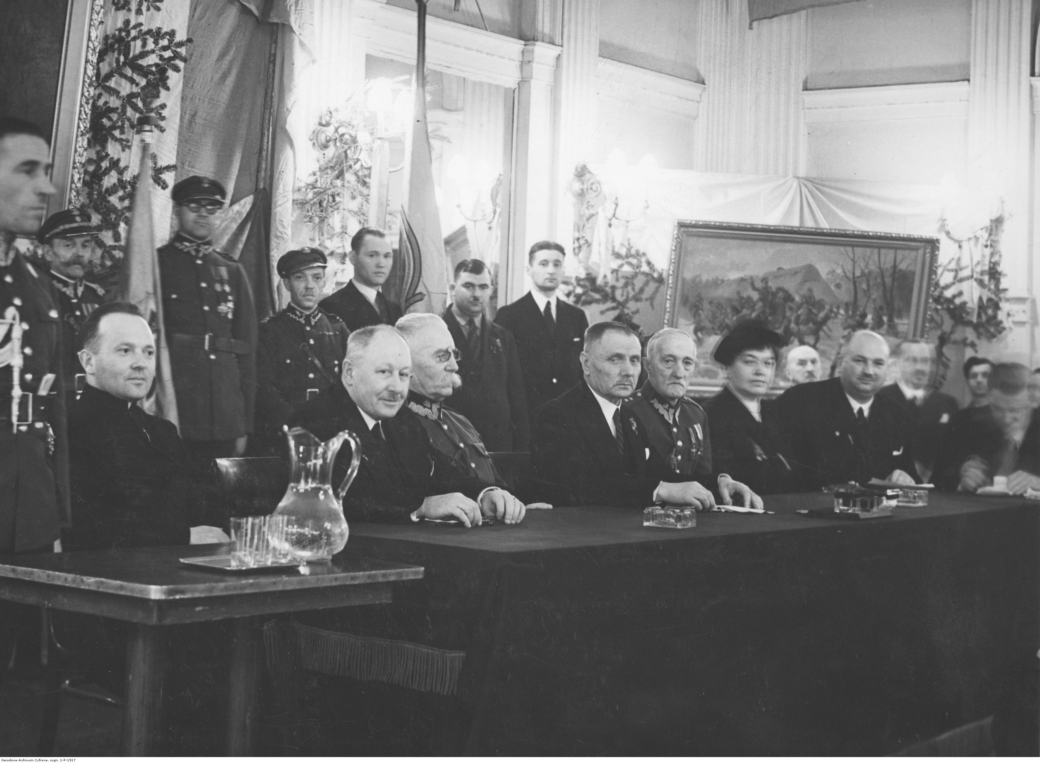 Akademia Związku Żołnierzy I Polskiego Korpusu Wschodniego w sali Towarzystwa Wioślarskiego - prezydium akademii. Widoczni m.in.: generał Mieczysław Poniatowski (siedzi 7. z lewej), generał Gustaw Ostapowicz, ksiądz Gawecki. Koncern Ilustrowany Kurier Codzienny - Archiwum Ilustracji. Sygnatura: 1-P-1917